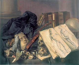 Г.Гзель. Суета сует. Ок. 1700 г. Х., м. Художественный музей Санкт-Галлена, Швейцария